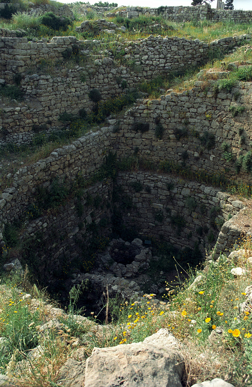 Byblos